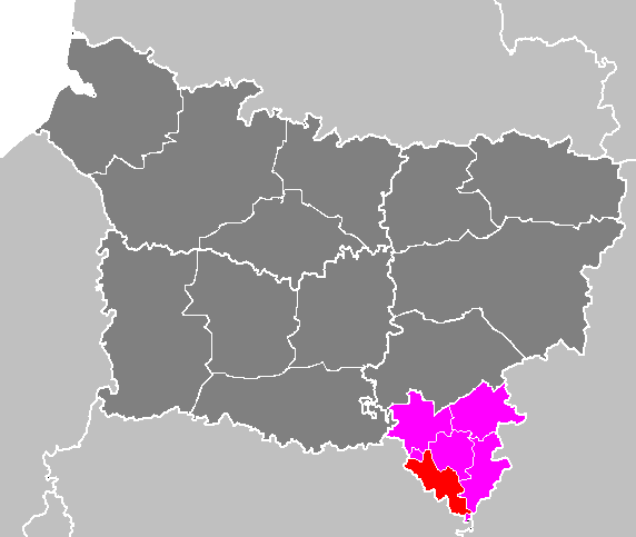 Carte du canton de Charly sur Marne